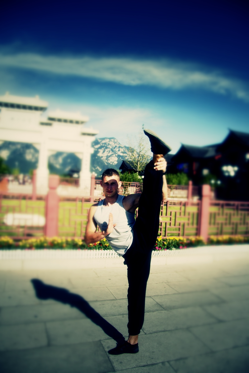 Prezentacja gimnastyczna. Fot. Mariusz Barański